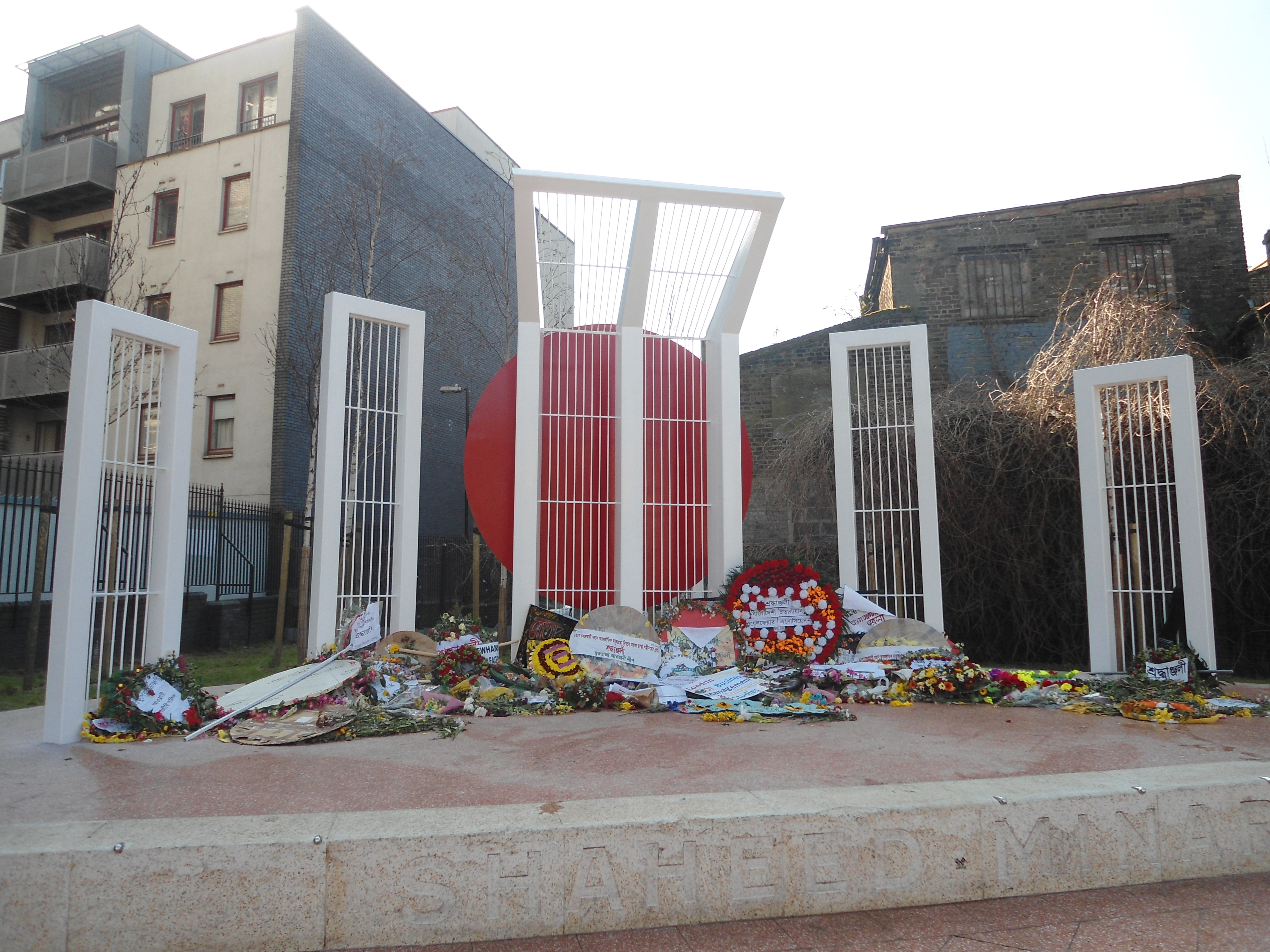 আলতাব আলী পার্কার শহীদ মিনার